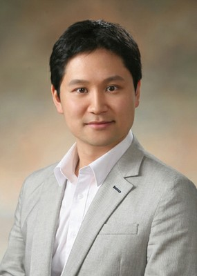 한국어 (조선): 권성훈 교수